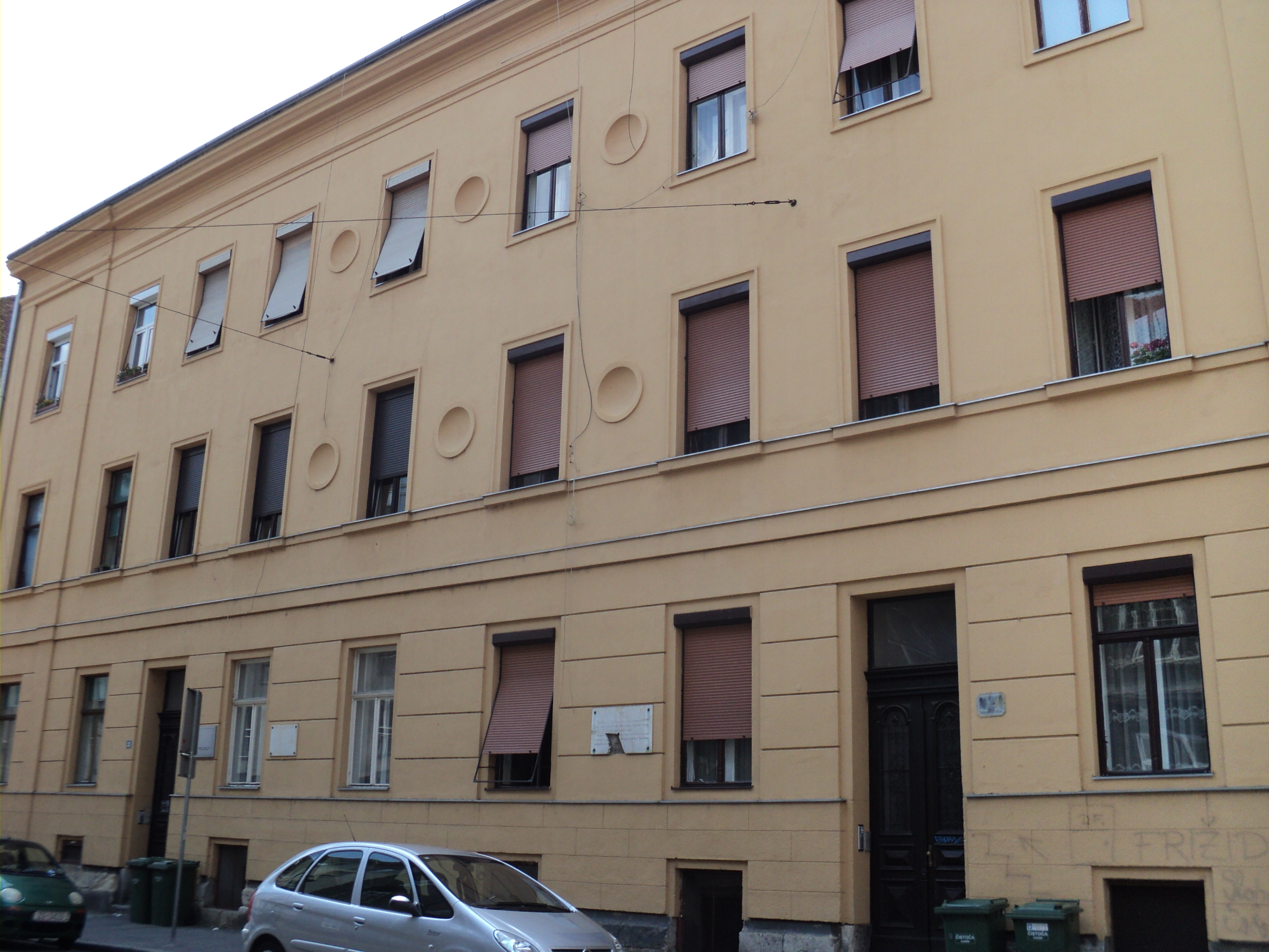 Zgrada u Zagrebu u kojoj je osnovan SKOJ 1919. godine. Self-made. Jun 2011.